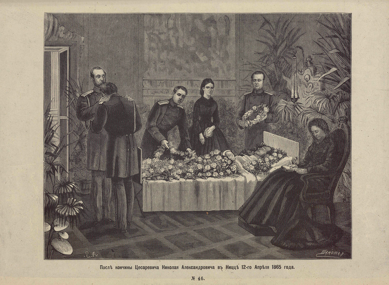 История царствования императора Александра II в картинах